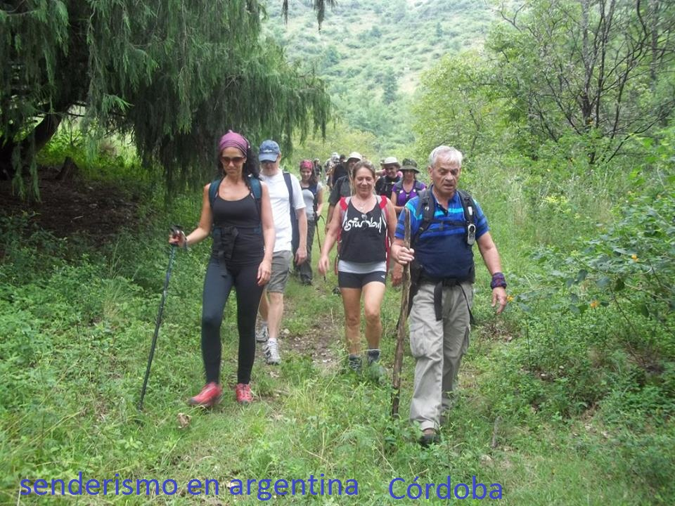 Caminata en San Clemente, Valle de Punilla en la provincia de Córdoba Argentina